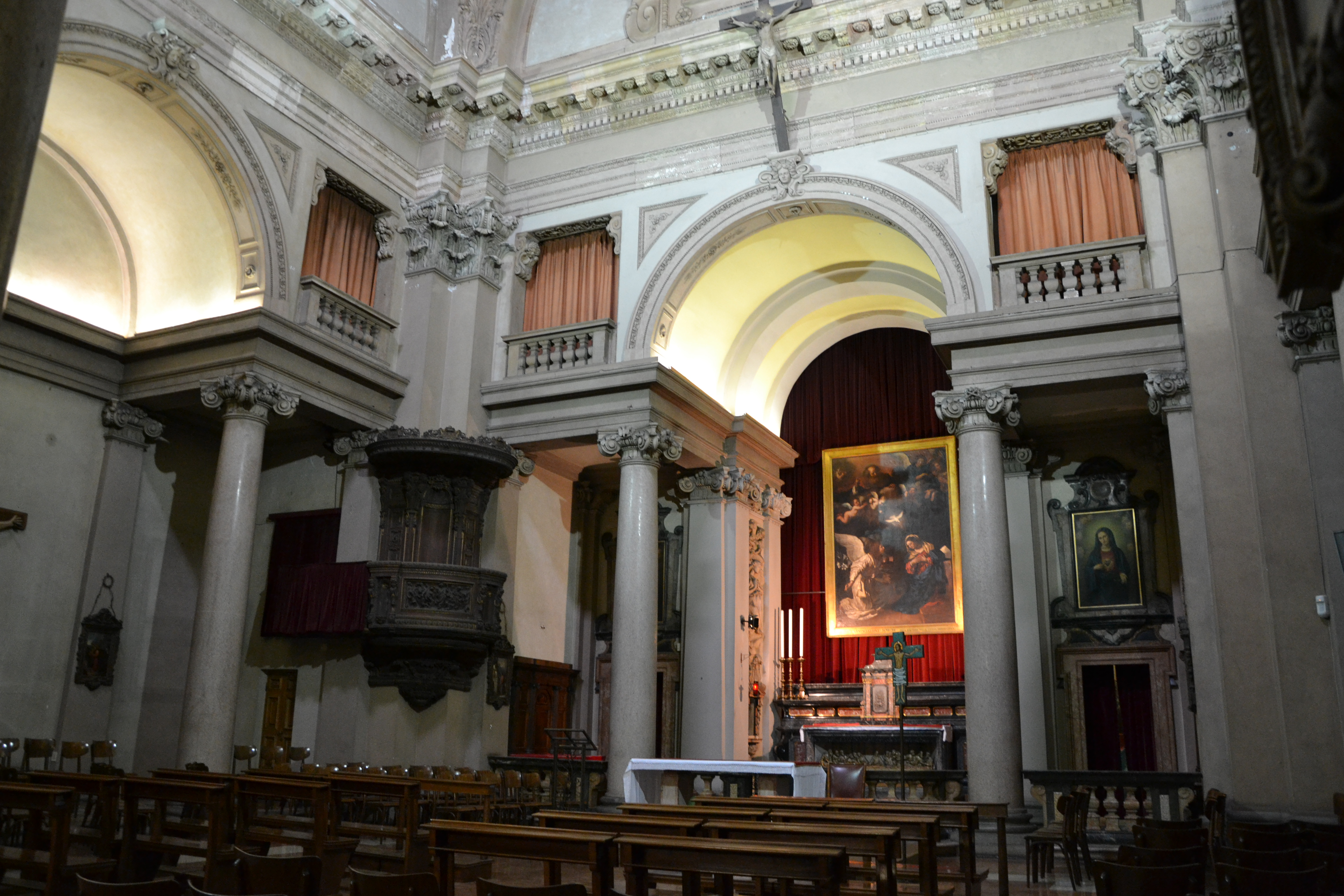 Milano - Università Statale, S. Maria Annunciata, interno